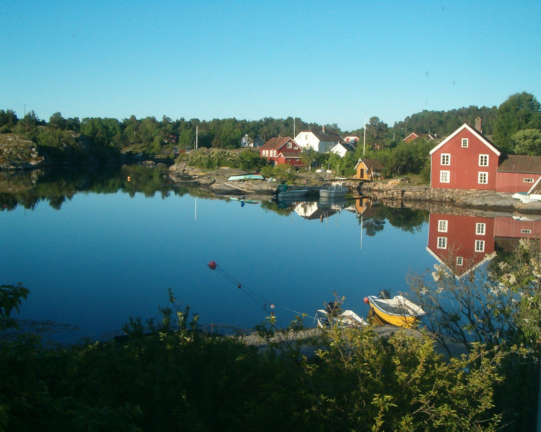 Borøykilen Foto: Bling123.